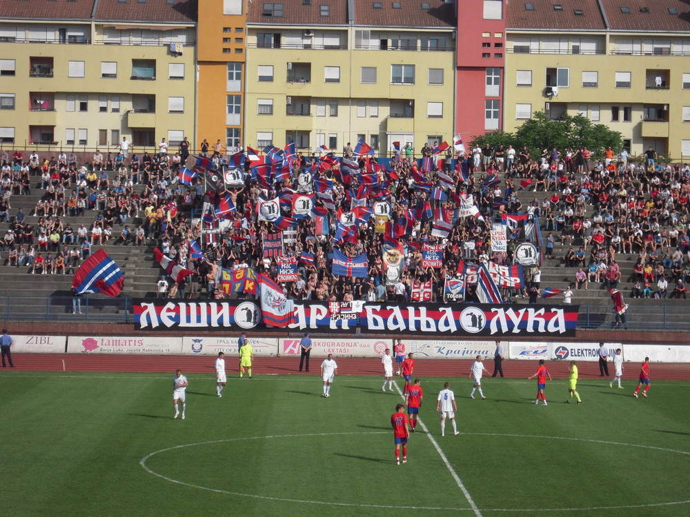 Lešinari